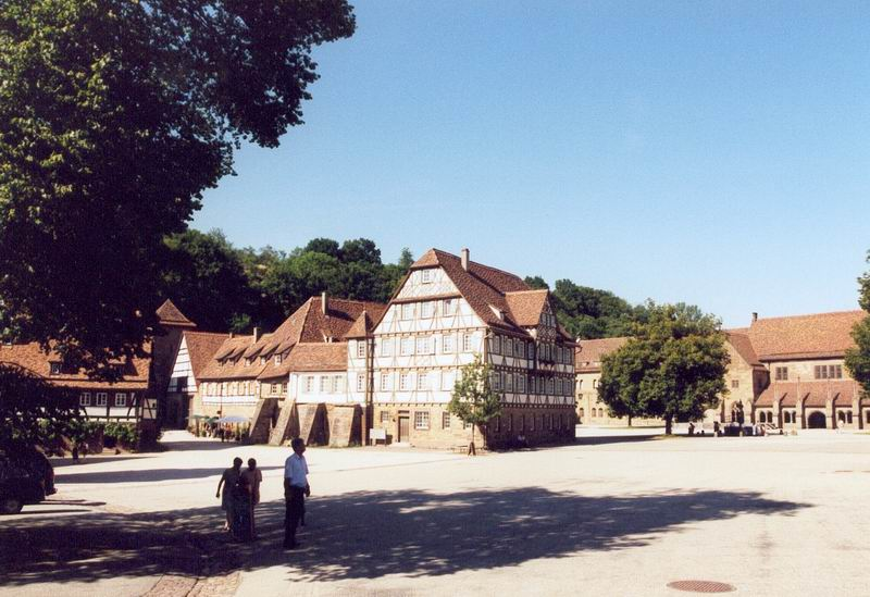 Aufnahme zeigt den Hofbereich des Klosters Maulbronn.